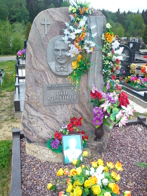 Пётр Юрченков, Северное кладбище, Минск, 20.05.17